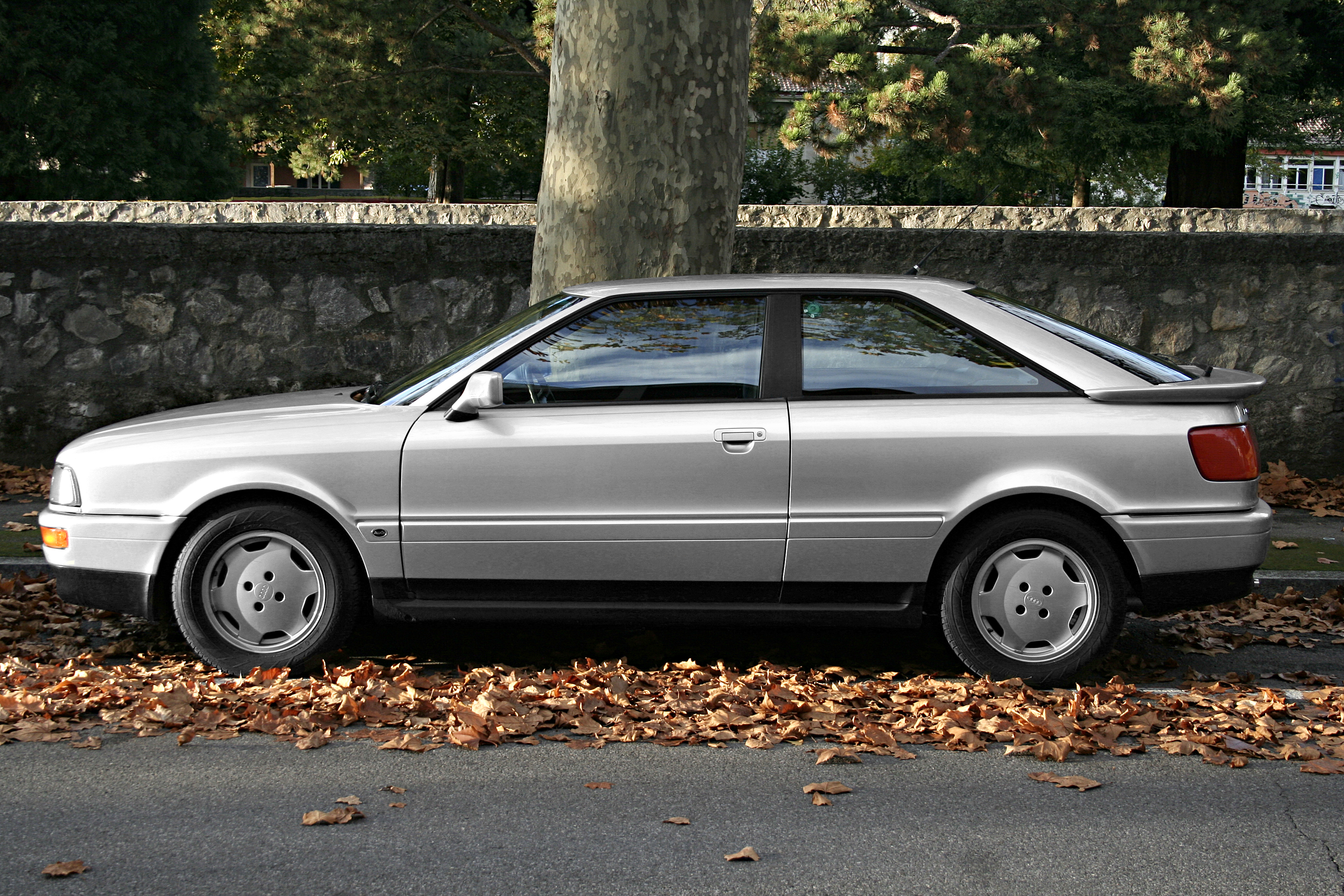 Audi Coupé 2.3E typ 89 136cv (100kw) extérieur argent Zermatt, intérieur Nautic état original, Suisse